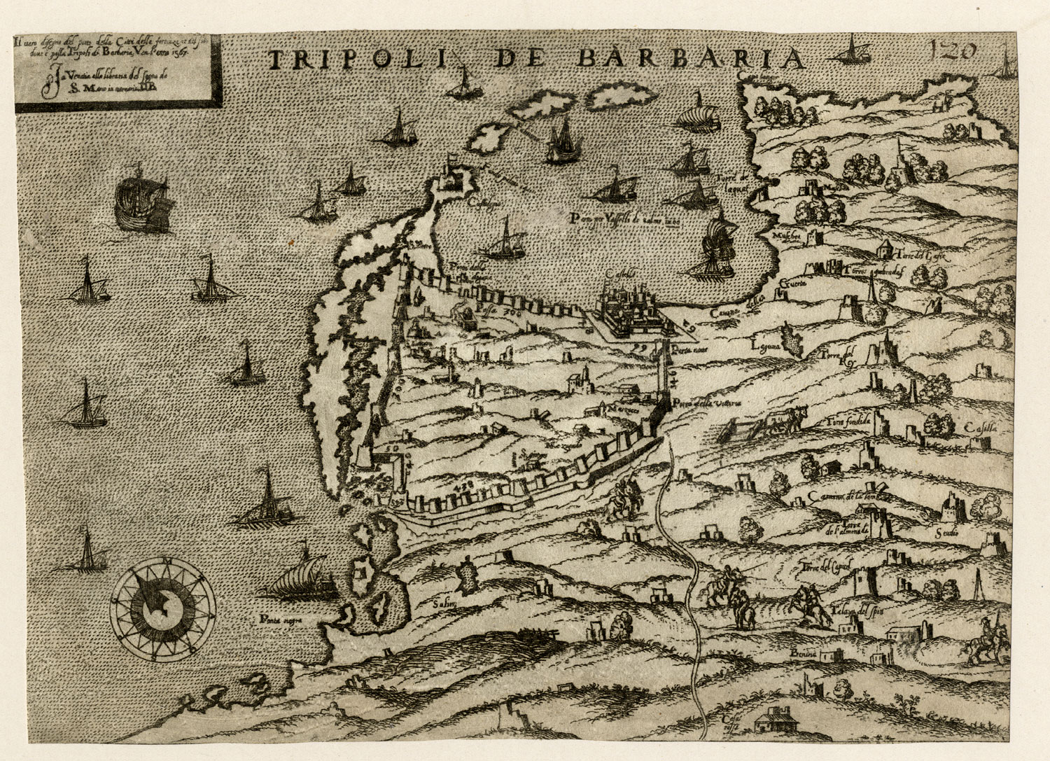 Il vero Disegno del porto, della città, delle fortezze et del sito, dove è posta Tripoli di Barbaria; Kupferstich, 1561